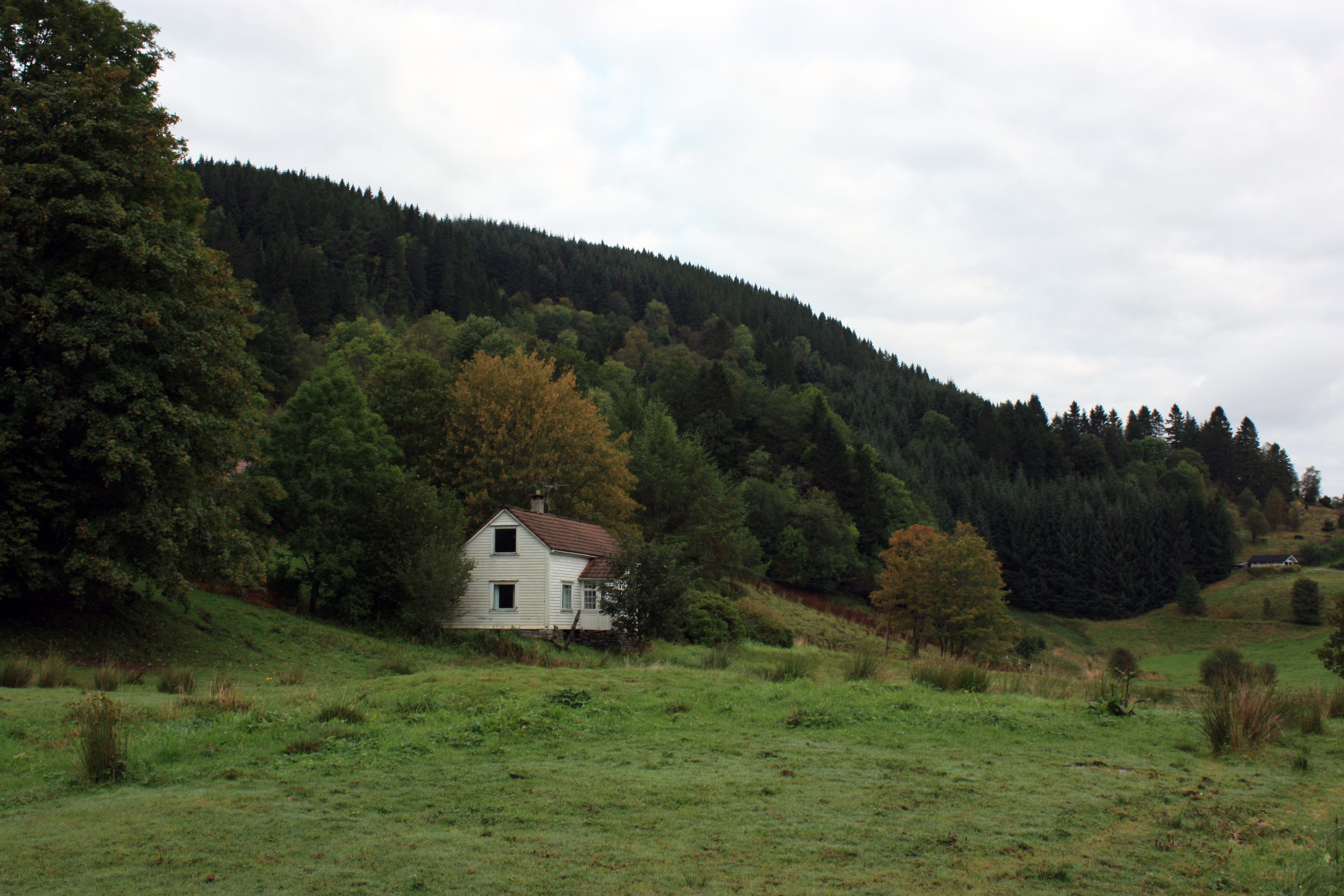 Ytre Hamre, Fana, Bergen.